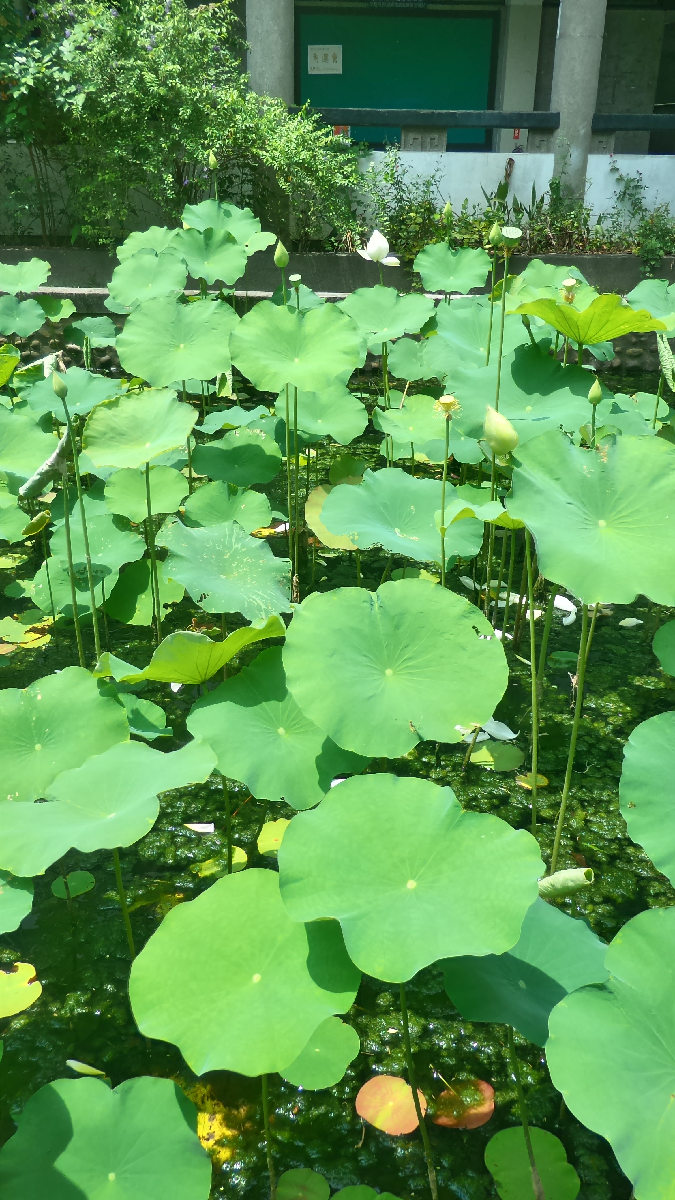 asus zen fone zoom-蓮葉